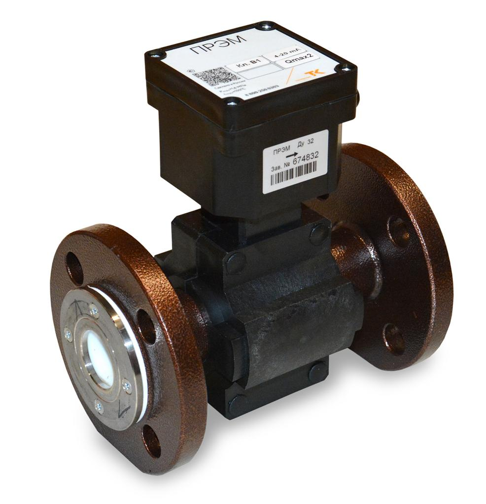 Электромагнитный расходомер ПРЭМ, марки "Теплоком"